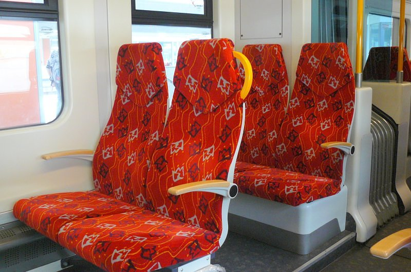 Fotele w elektrycznym zespole trakcyjnym EN77-002.